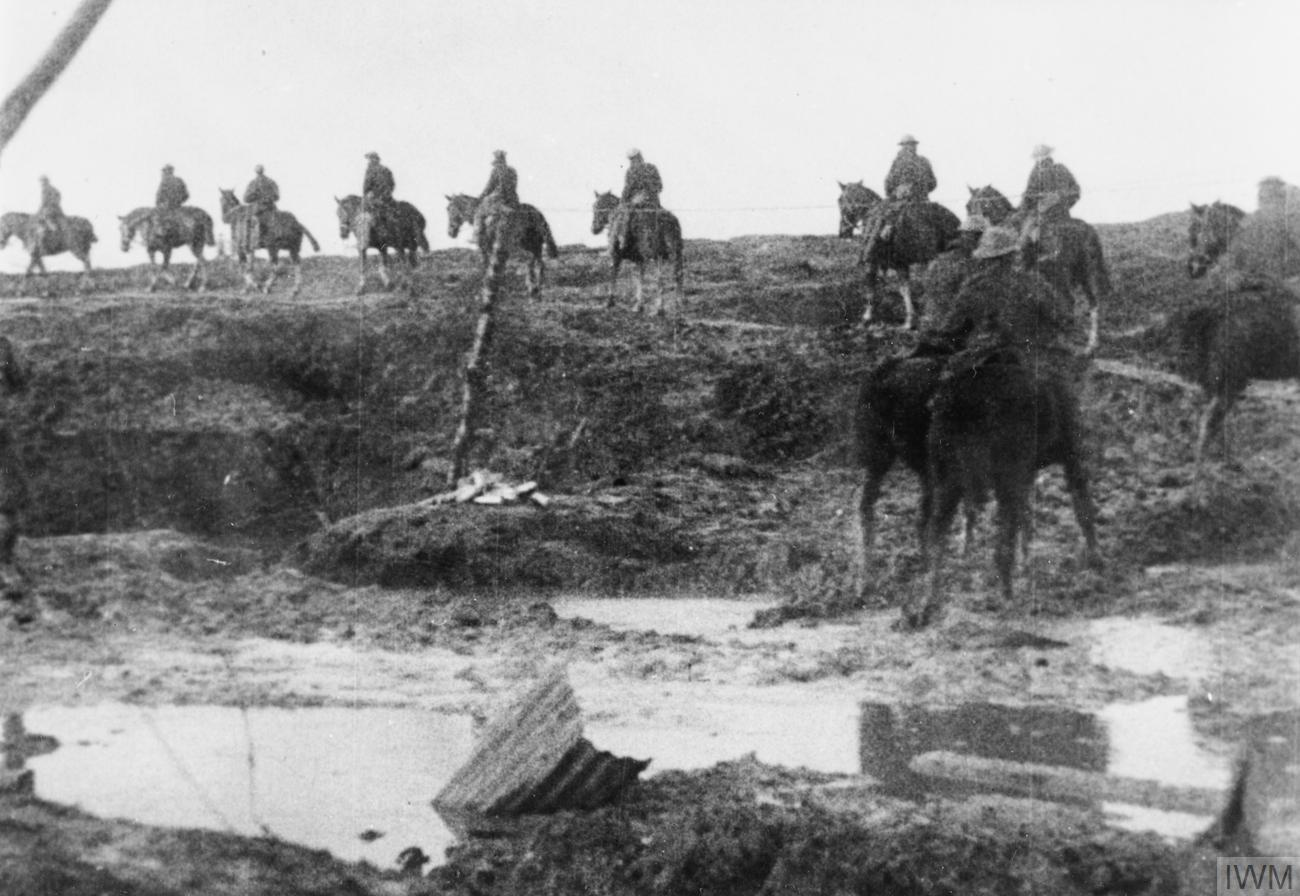 British artillery soldiers during the Battle of the Ancre